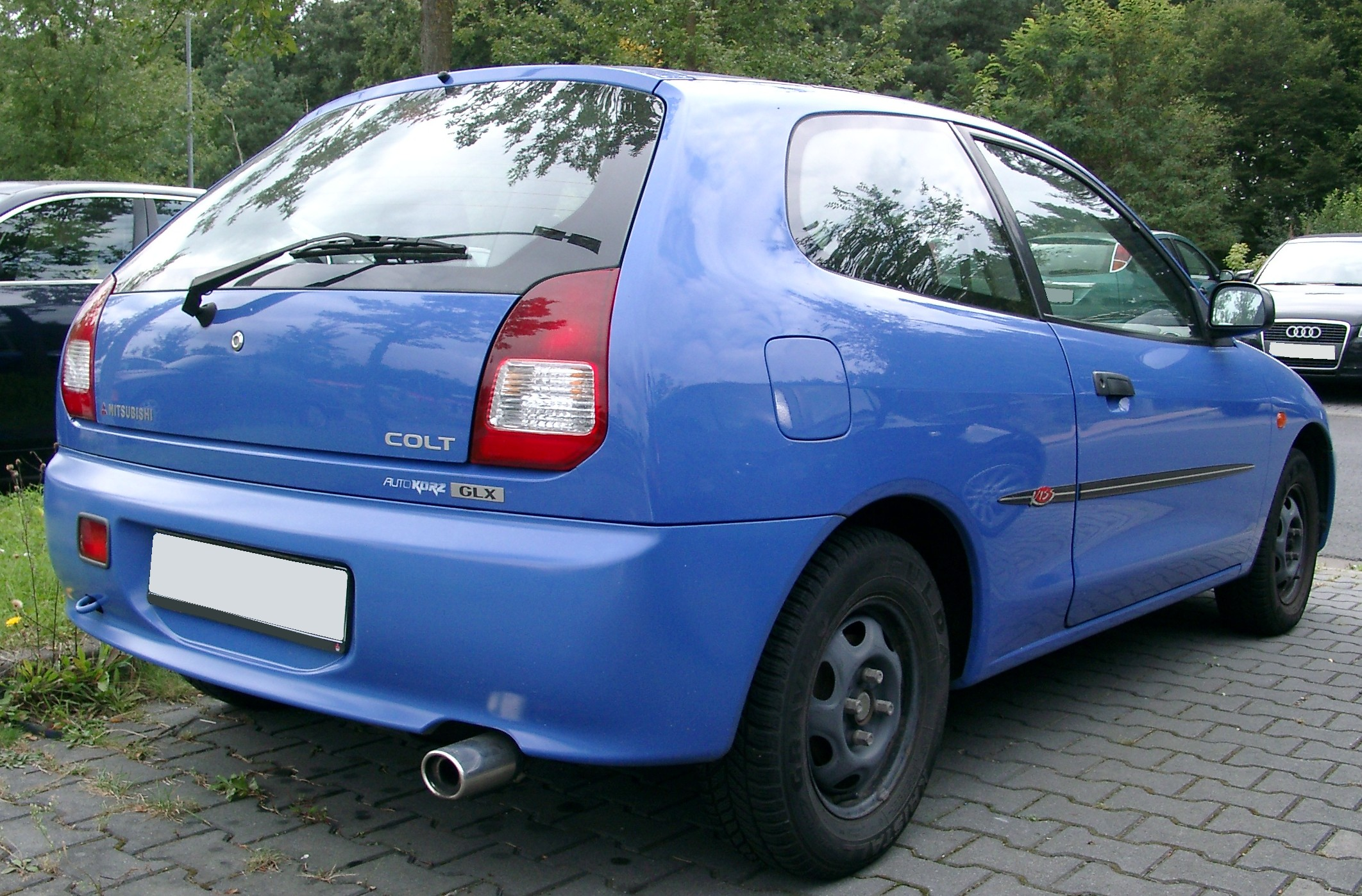 Mitsubishi Colt